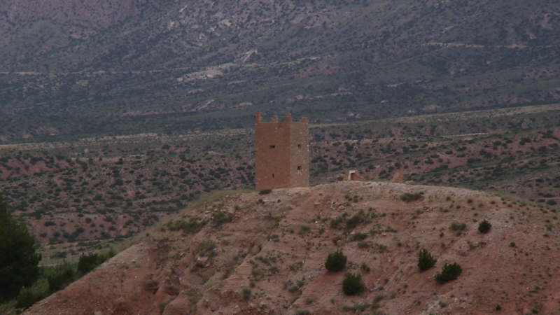 Tour d'un fort datant du début de la période française